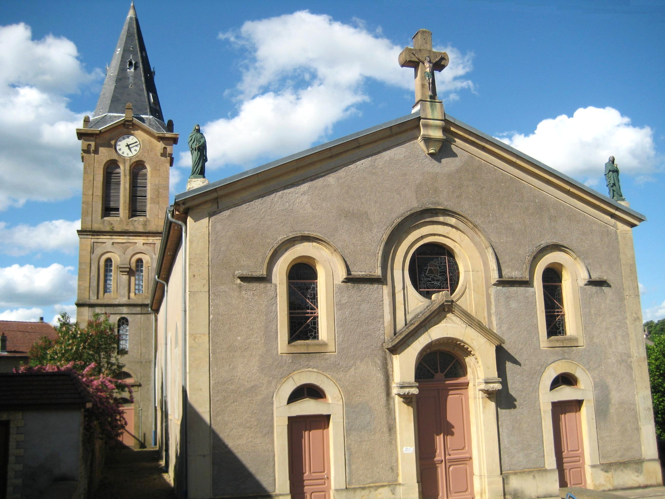 Description Église d'Auboué Date 18 May 2009 Source mon appareil photo Author Aimelaime Église d'Auboué